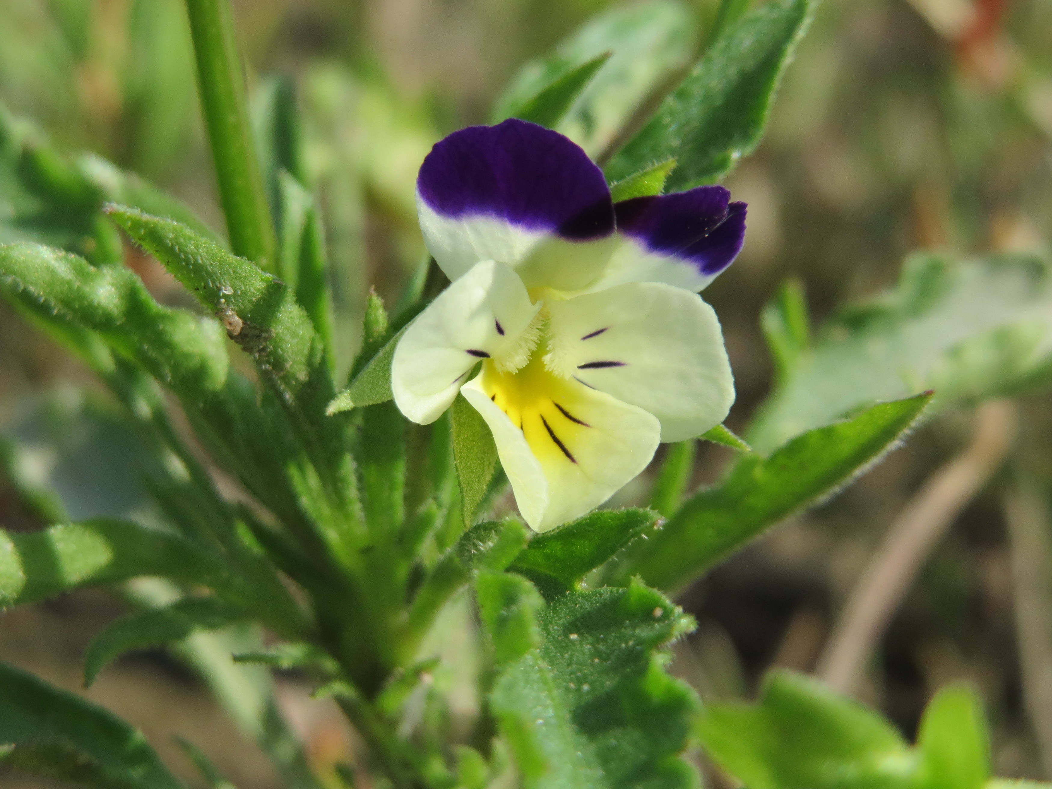 Großblütiges Acker-Stiefmütterchen (Viola arvensis ssp. megalantha) bei Reilingen